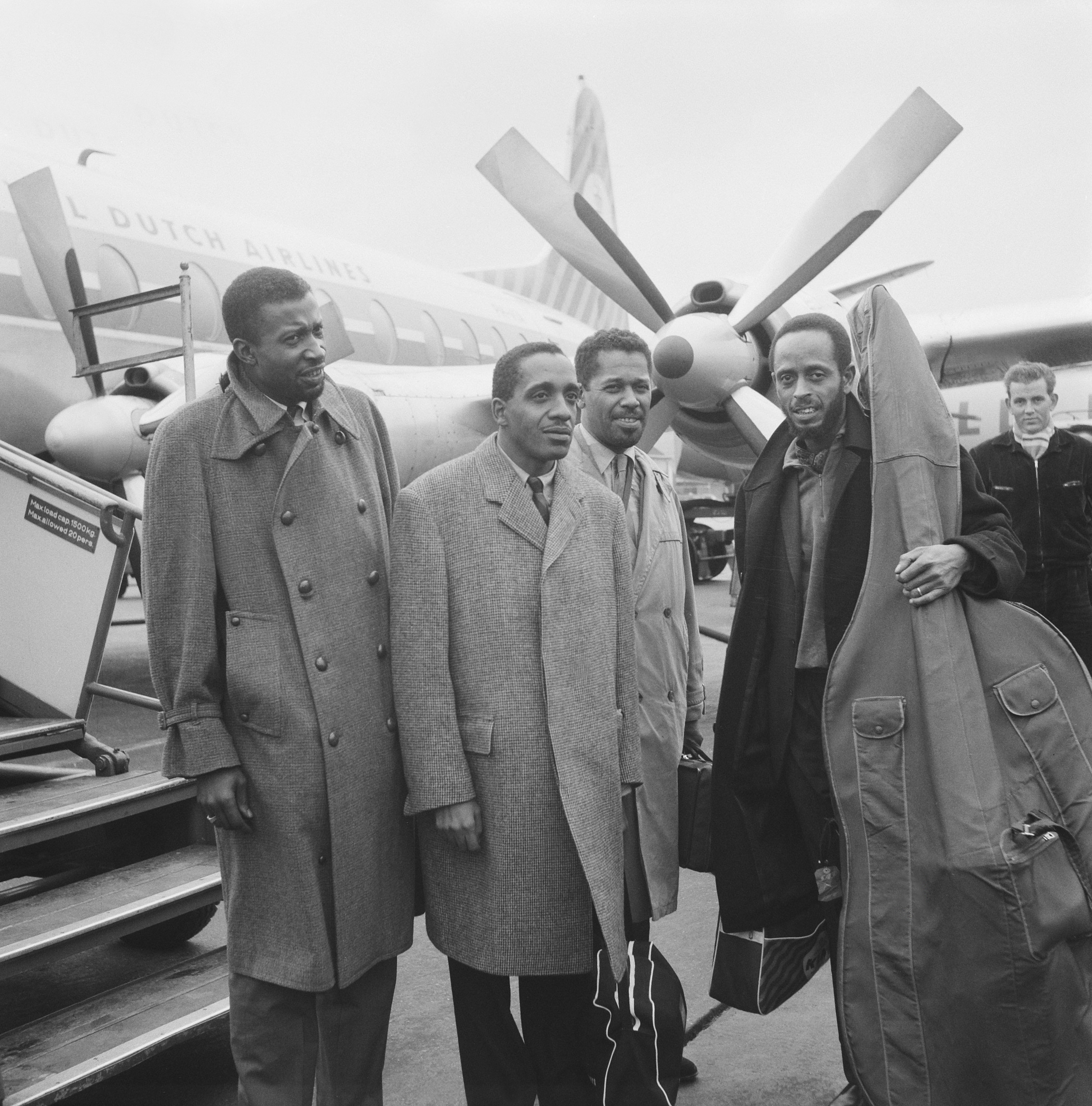 Aankomst Modern Jazz Quartet op Schiphol. v.l.n.r: drummer Connie Kay. vibrafonist Milt Jackson, pianist John Lewis en bassist Percy Heath. Datum: 20 oktober 1961